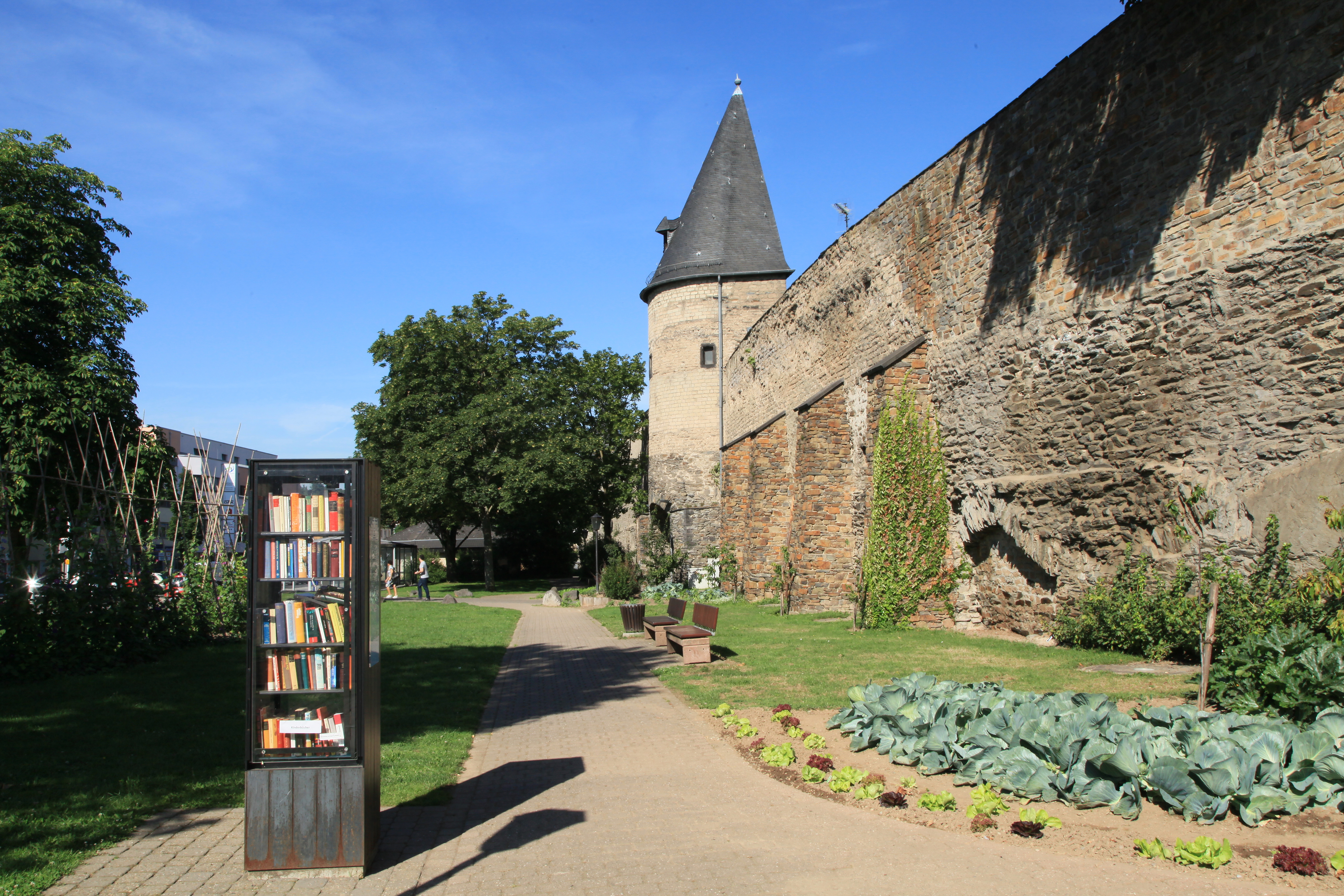 Stadtmauer, Schlossgarten (Fortsetzung des Stadtgrabens) und Ottenturm, Am Stadtgraben in Andernach